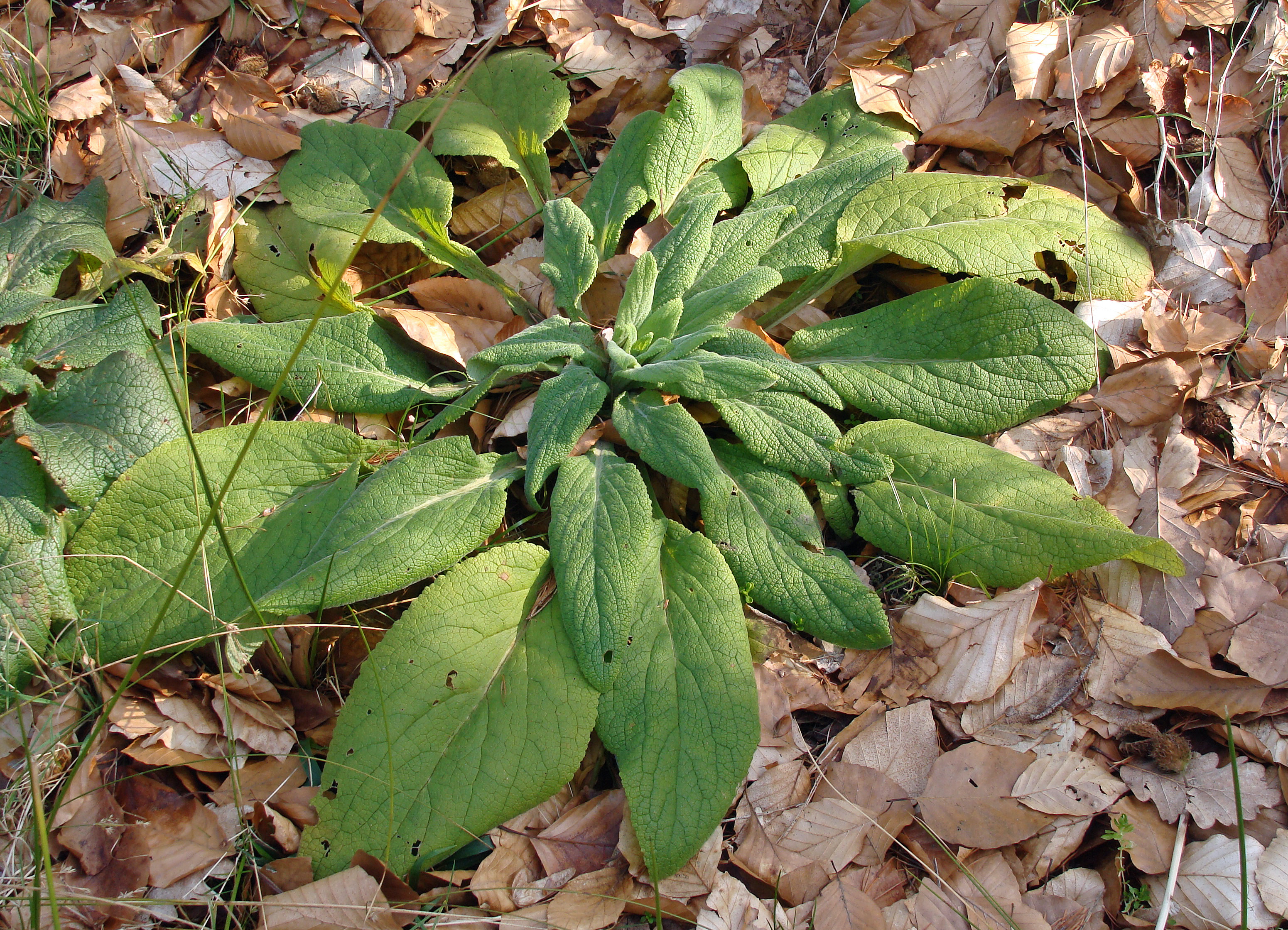 Digitale pourpre, Digitalis purpurea (feuilles). Photographiée dans la forêt de Zang, entre L'Hôpital (Moselle) et Saint-Avold le 7 mars 2014